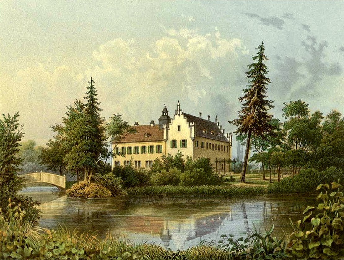 Rittergut Schilfa, Kreis Weißensee, Provinz Sachsen, Lithografie aus dem 19. Jahrhundert